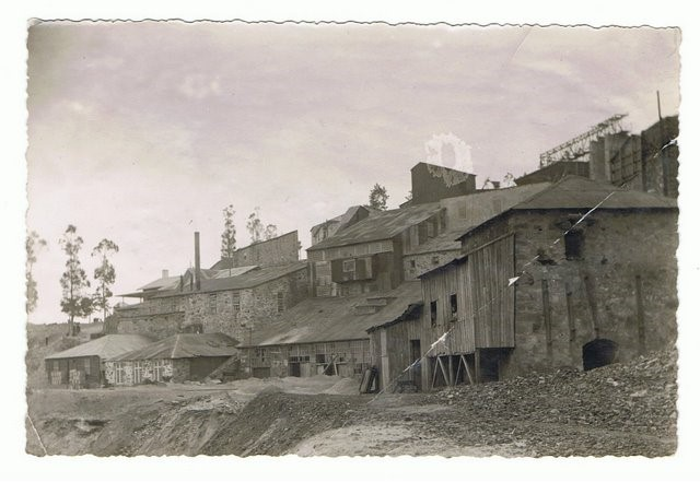 Foto publicada em 1945 do Livro do Pe. Leal